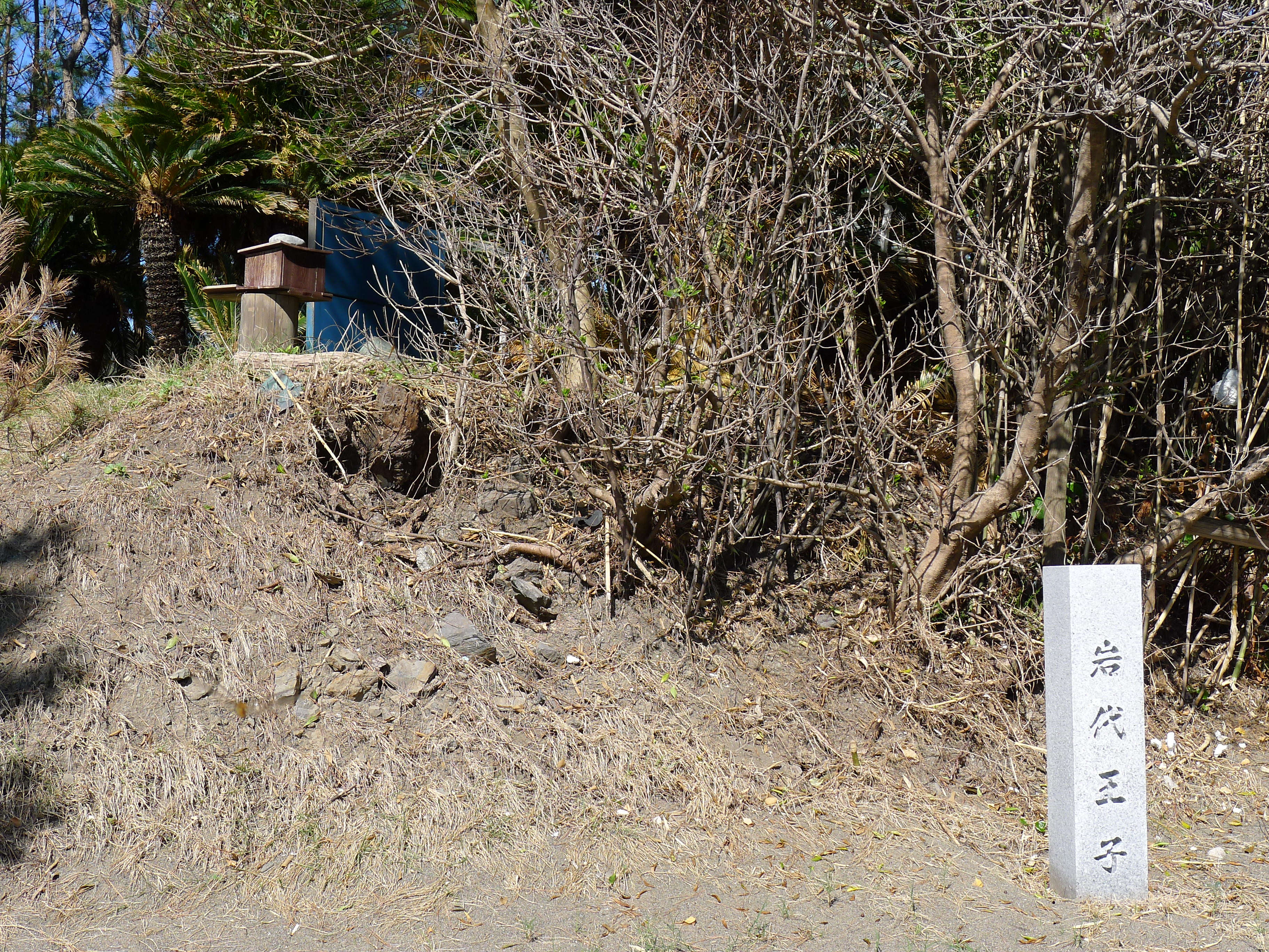 熊野古道・紀伊路の九十九王子の一つ岩代王子（和歌山県みなべ町）